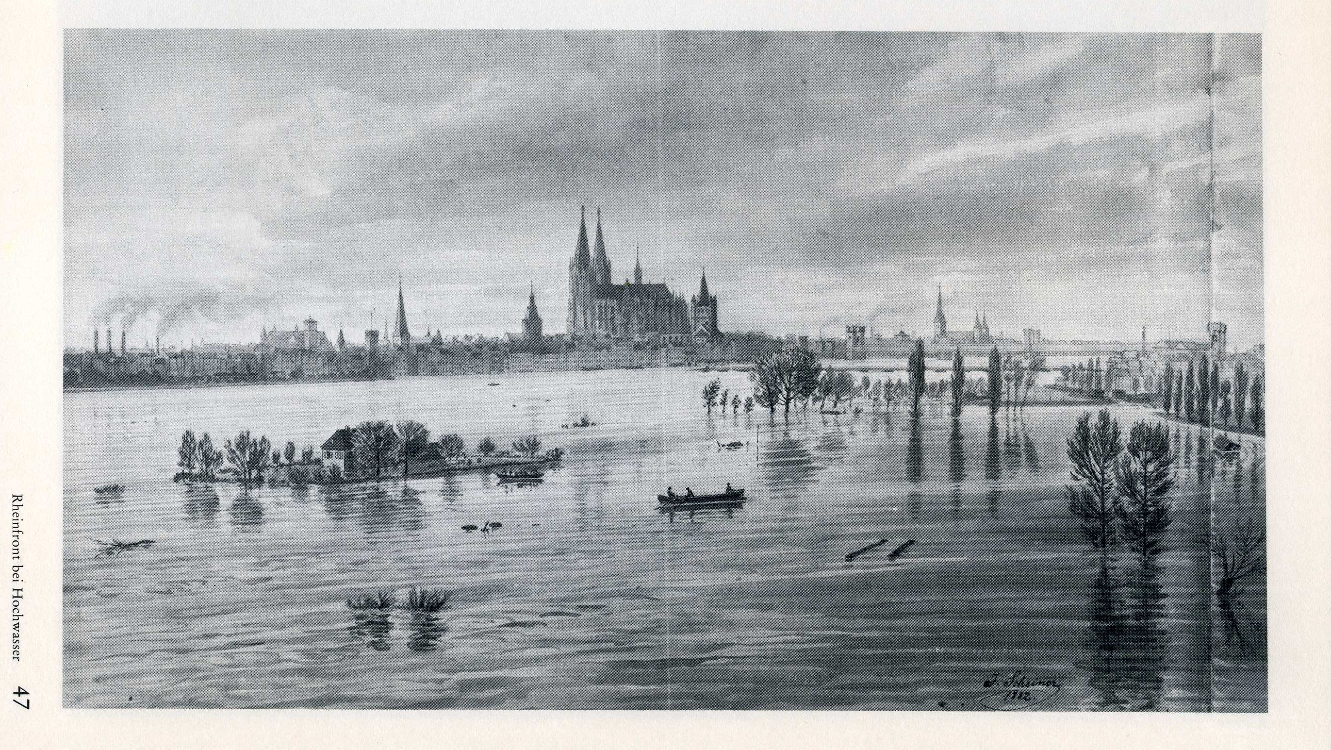 Köln, „Rheinfront bei Hochwasser“. Tuschzeichnung Jakob Scheiner 1882.